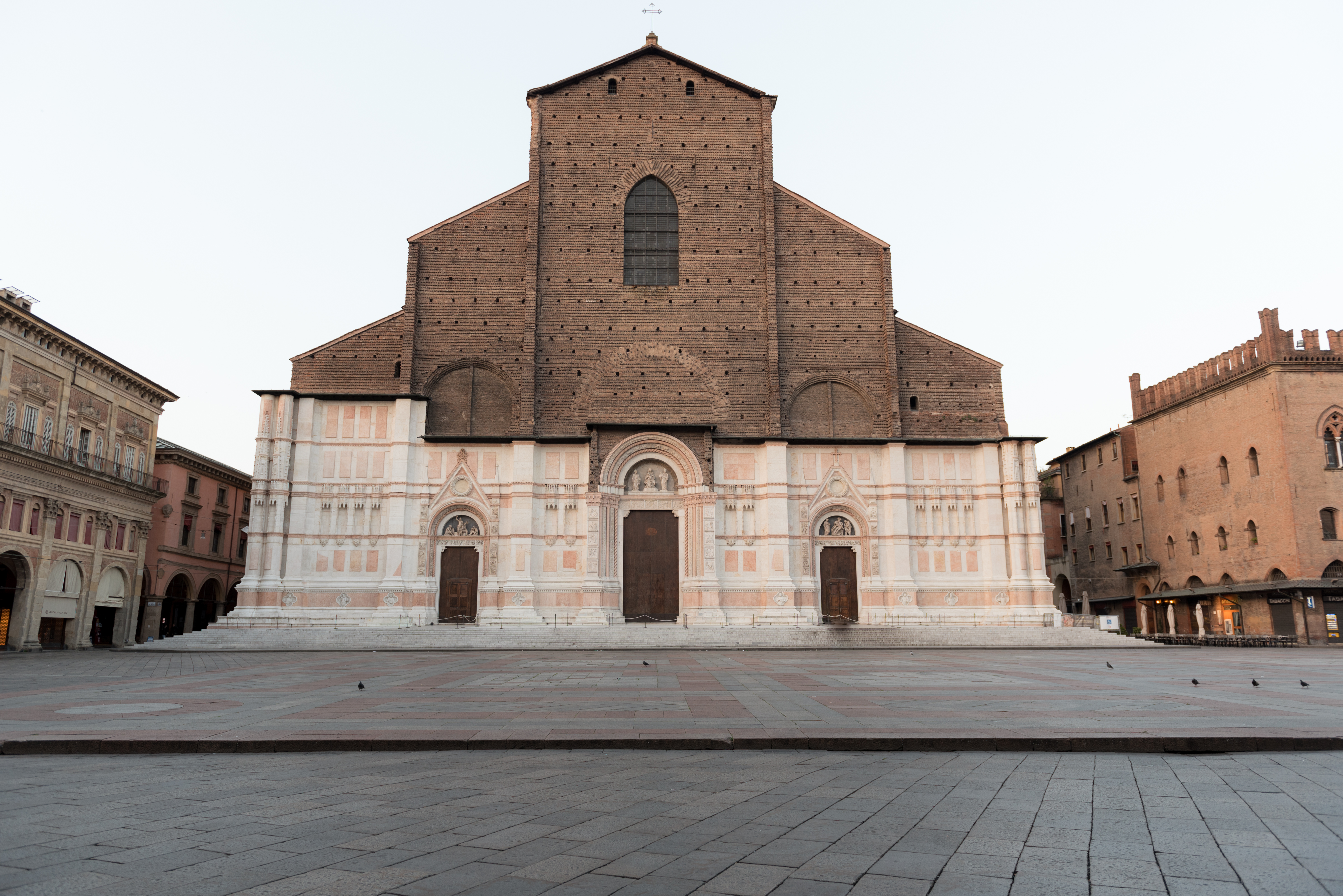 Basilica di Santo Stefano This is a photo of a monument which is part of cultural heritage of Italy.